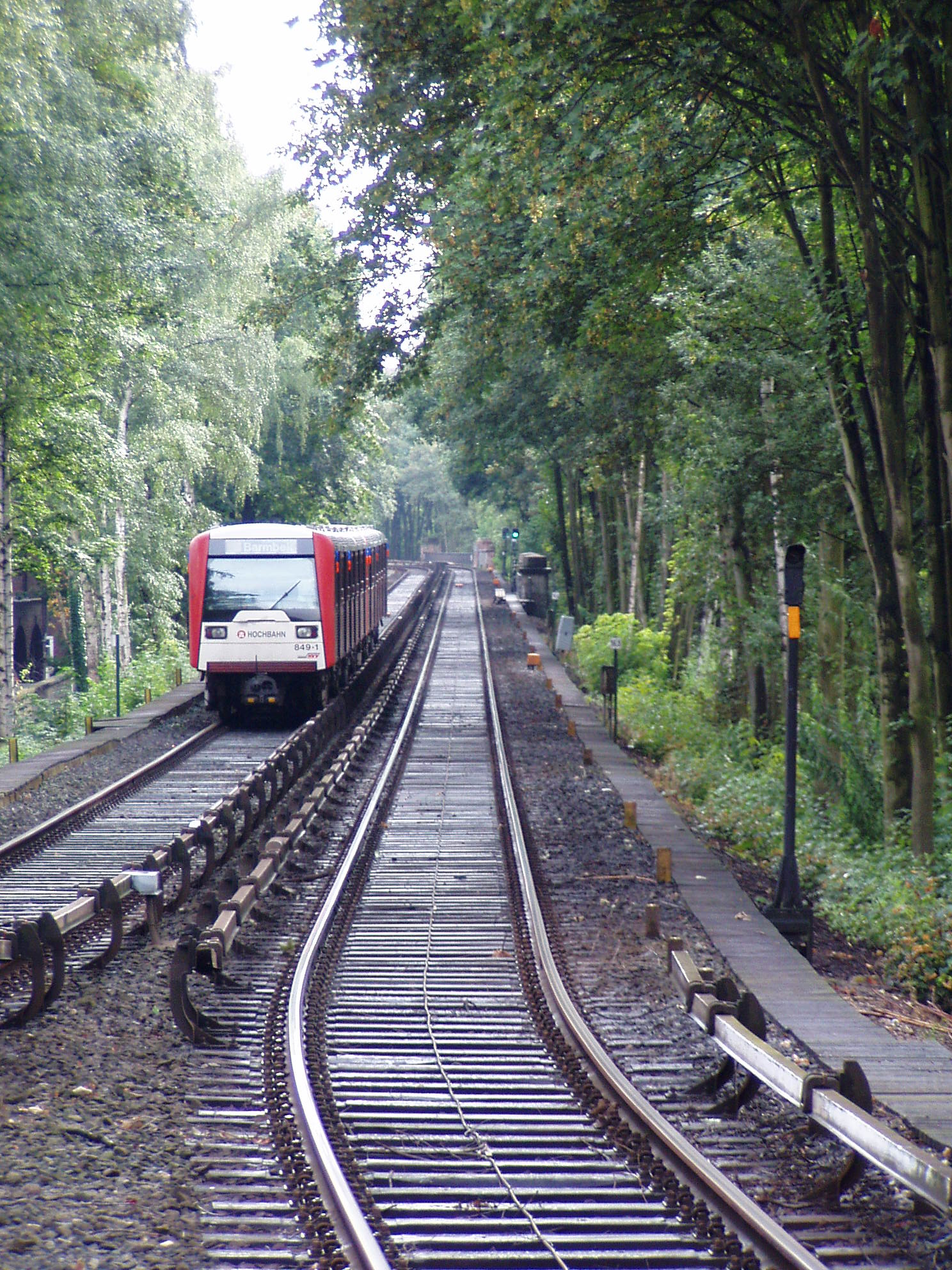 Hamburg. Linia metra U3 koło stacji Hoheluftbrücke. Trzecia szyna z odbiorem dolnym.